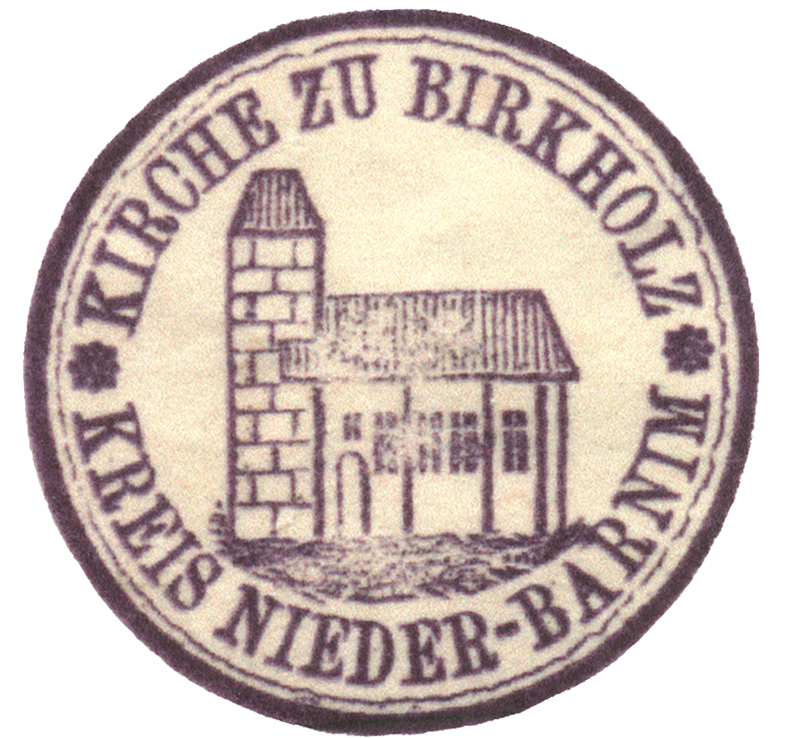 Der Stempel stellt die Kirche Birkholz (Bernau bei Berlin) dar, bevor sie 1827 umgebaut wurde. Dieser Stempel der Kirchengemeinde war bis um 1920 gültig.